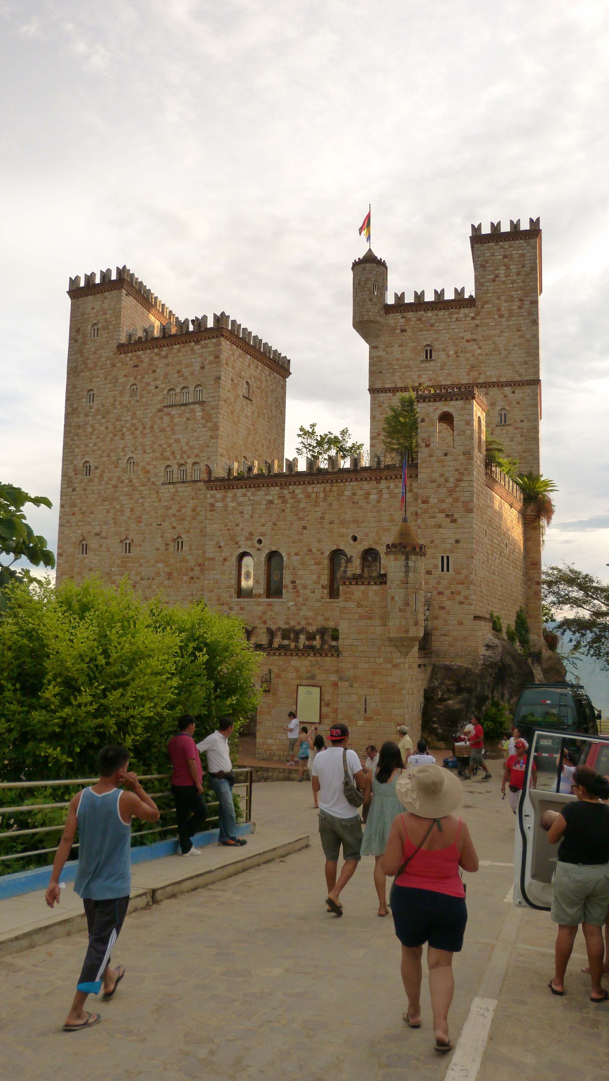 Castillo de Lamas, atractivo turístico de Lamas, Perú